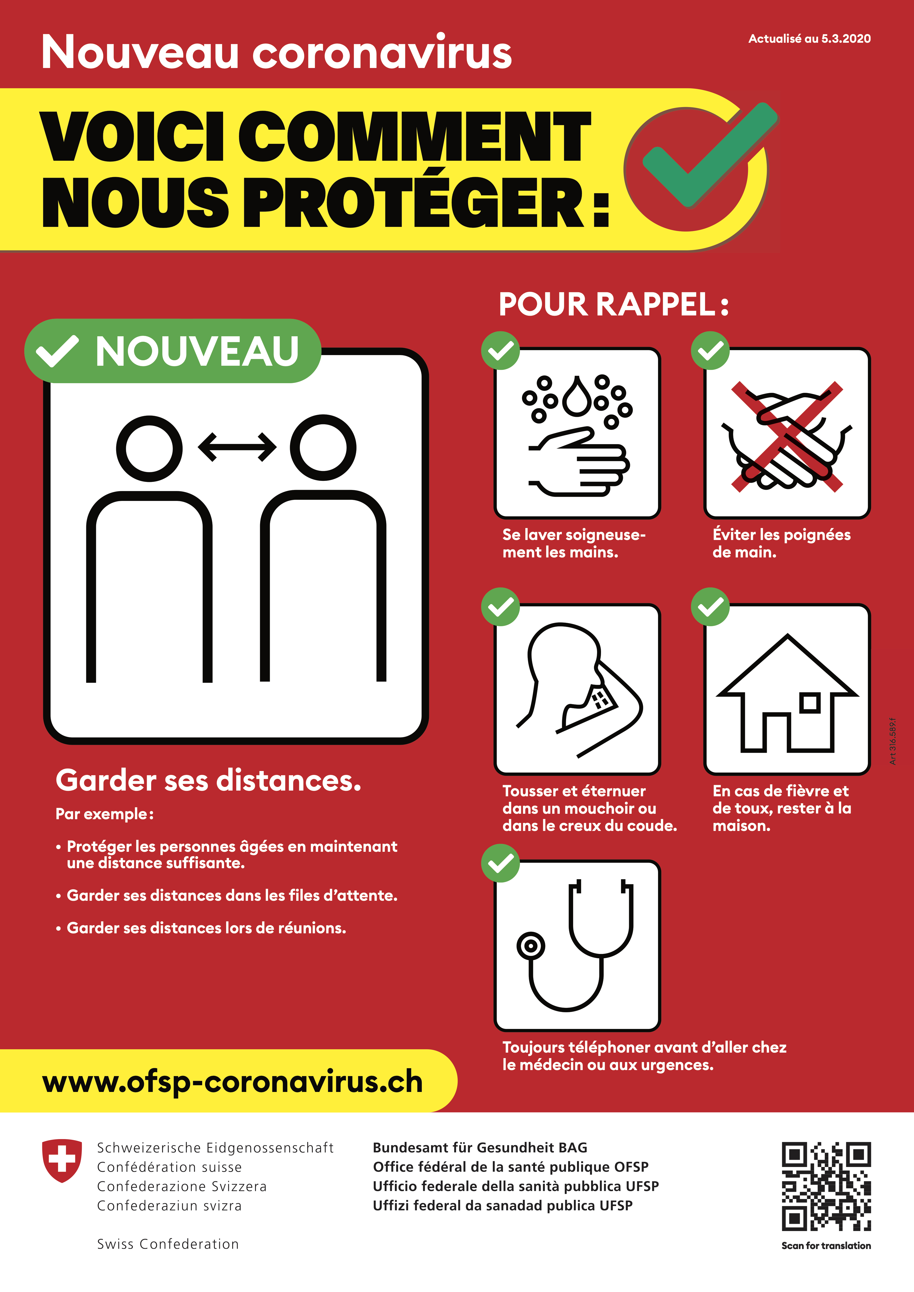 Affiche « Nouveau coronavirus : voici comment nous protéger » de l'Office fédéral de la santé publique (version du 5 mars 2020, en français).